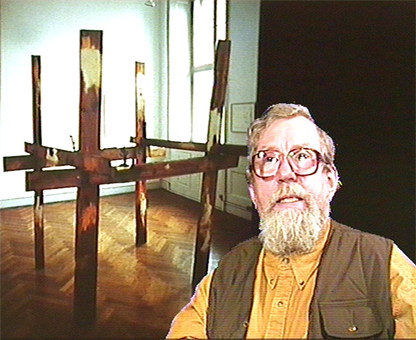 Portrait de Ib Braase.